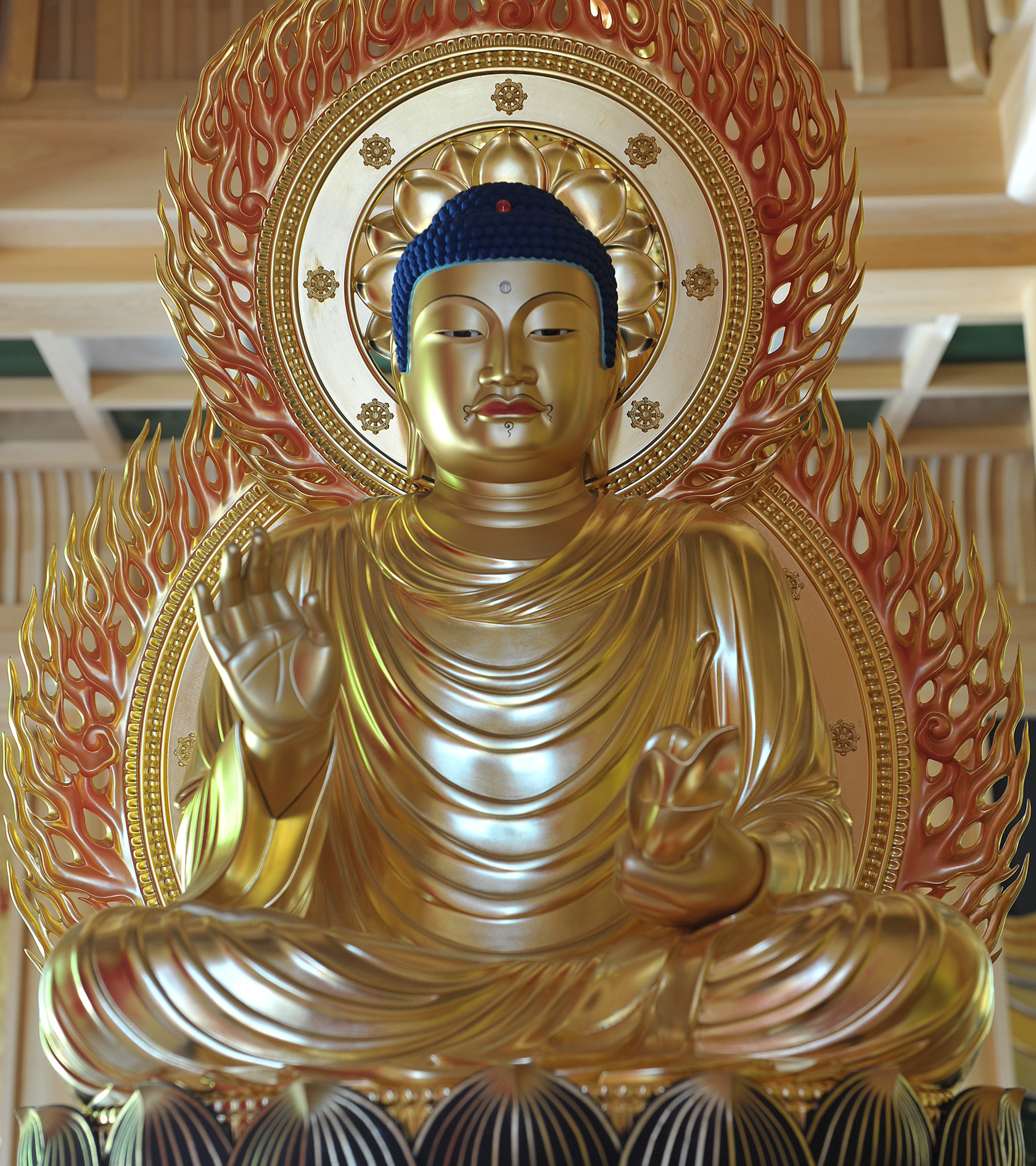 2018年5月12日に落成した蓮華院多宝塔に祀られる不空成就如来（五智如来の一体）。毎年1月13日・4月29日・6月13日にご開帳。